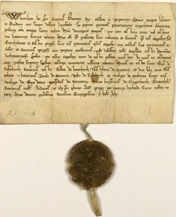 Dne 22.6.1250 vydal český král Václav I. darovací listinu pro kostel sv. Víta na Pražském hradě a svatovítskou kapitulu, poprvé je zde písemně uveden (mezi svědky) zakladatel rožmberské dynastie Vok I. z Rožmberka (Woko de Rosenberch).